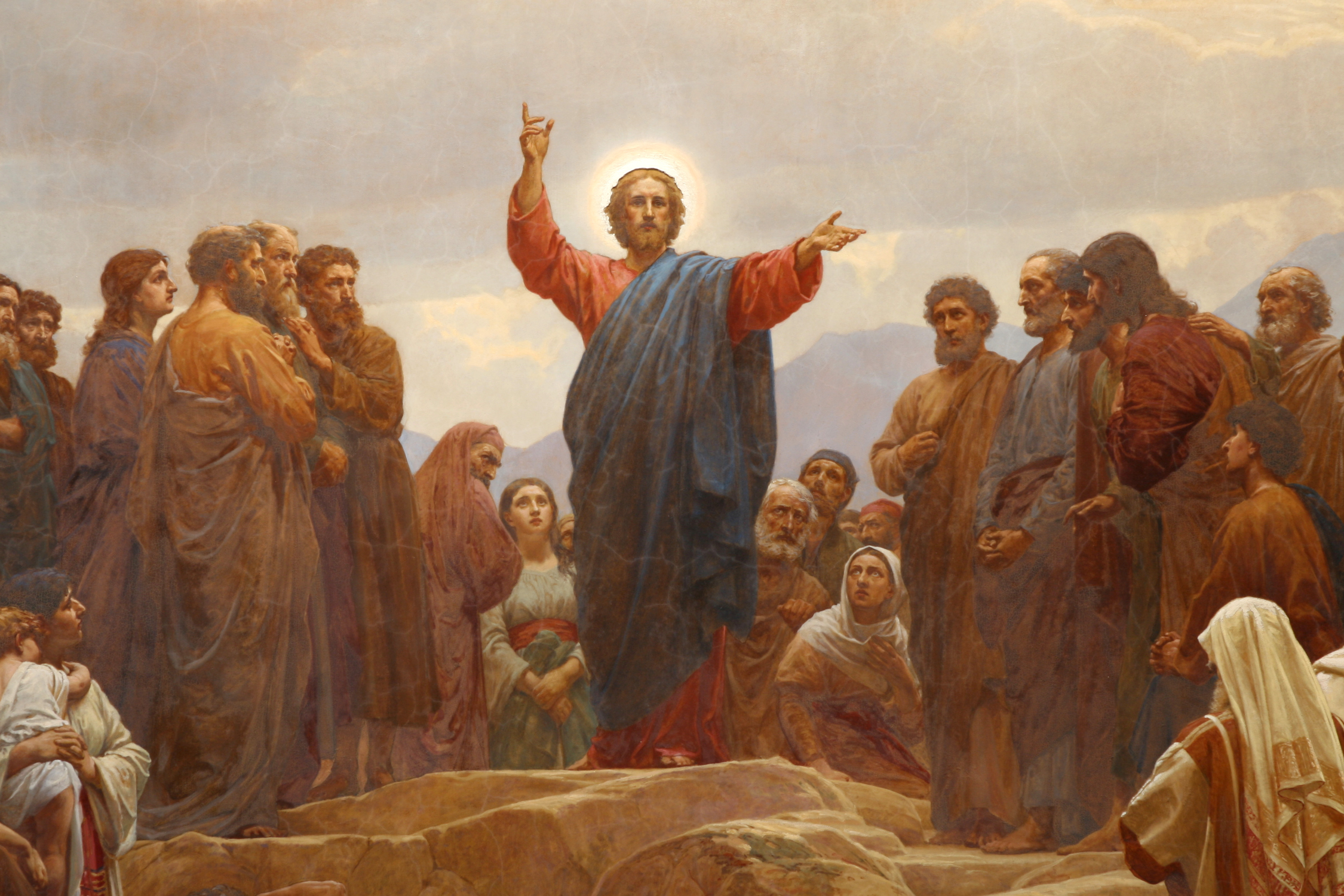 Sankt Matthæus Kirke, Copenhagen, Denmark. Altarpiece - "Sermon on the Mount" - detail By Henrik Olrik